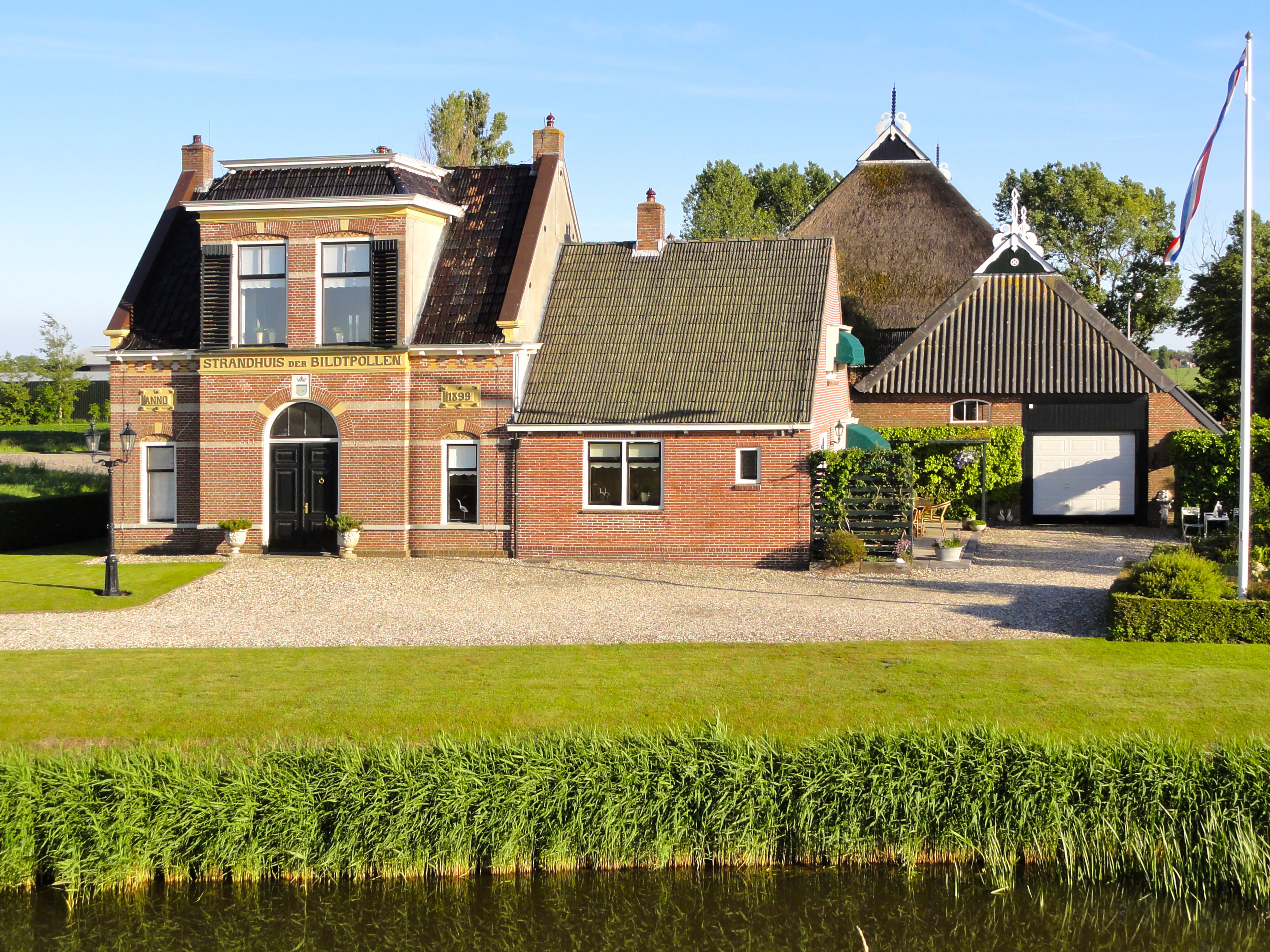 Schuringaweg 63 in Sint-Annaparochie